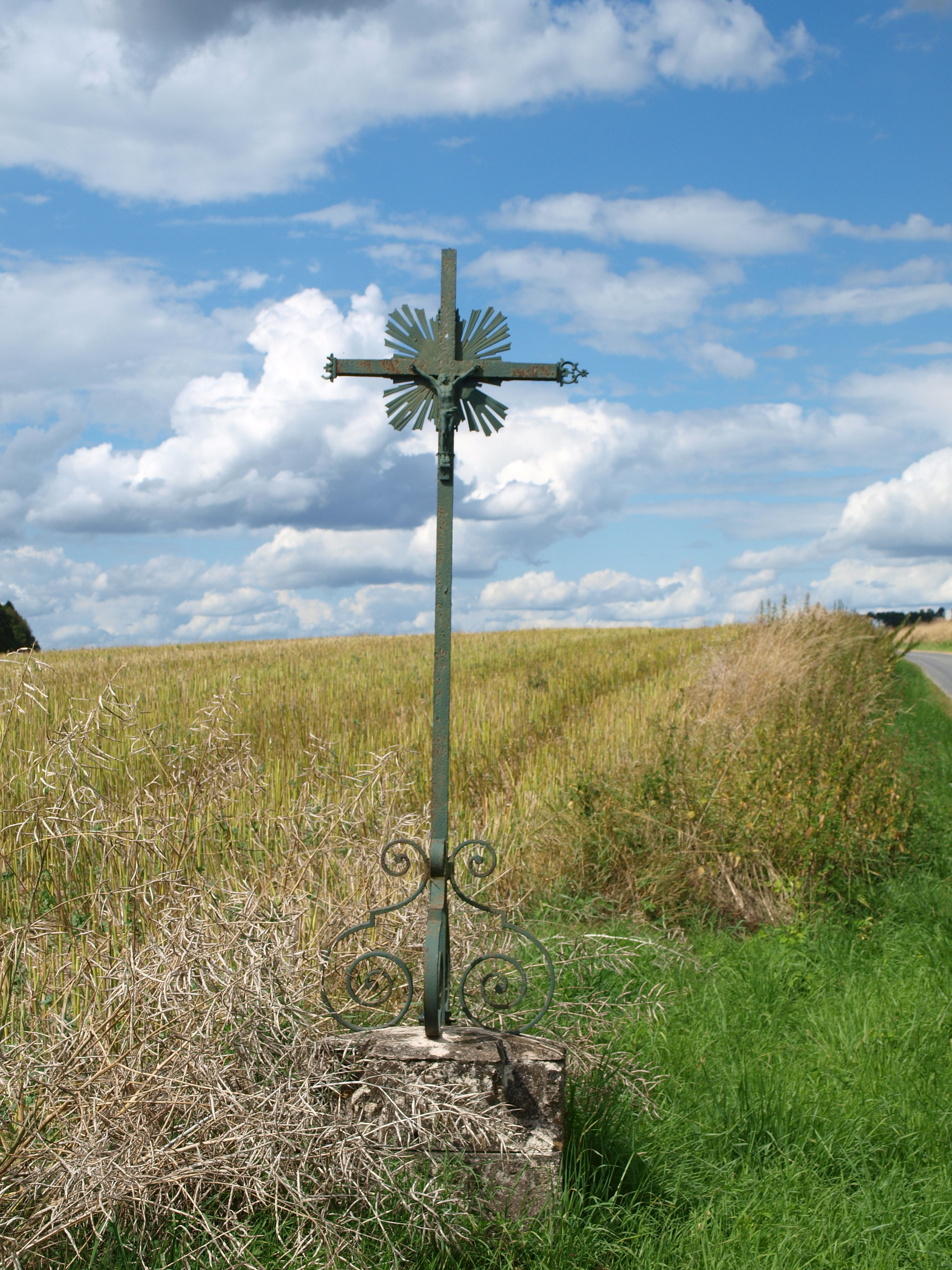 Autry (Ardennes, France) ; calvaire , route de Grandham